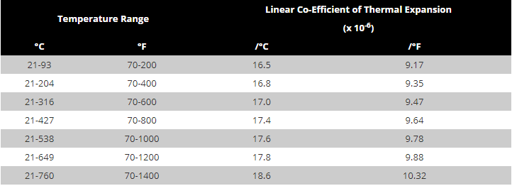 انبساط